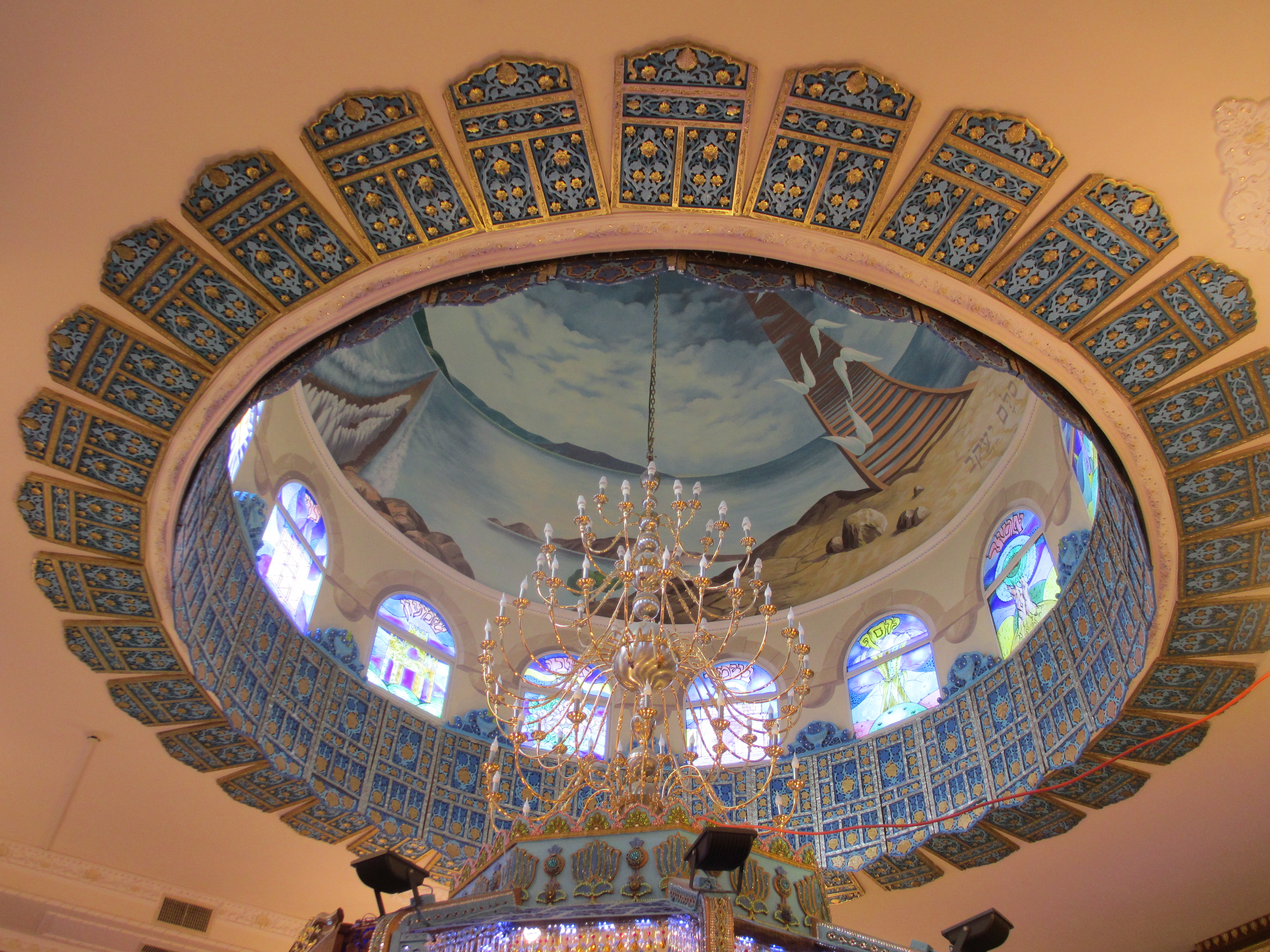 בית הכנסת הקווקזי בטירת כרמל